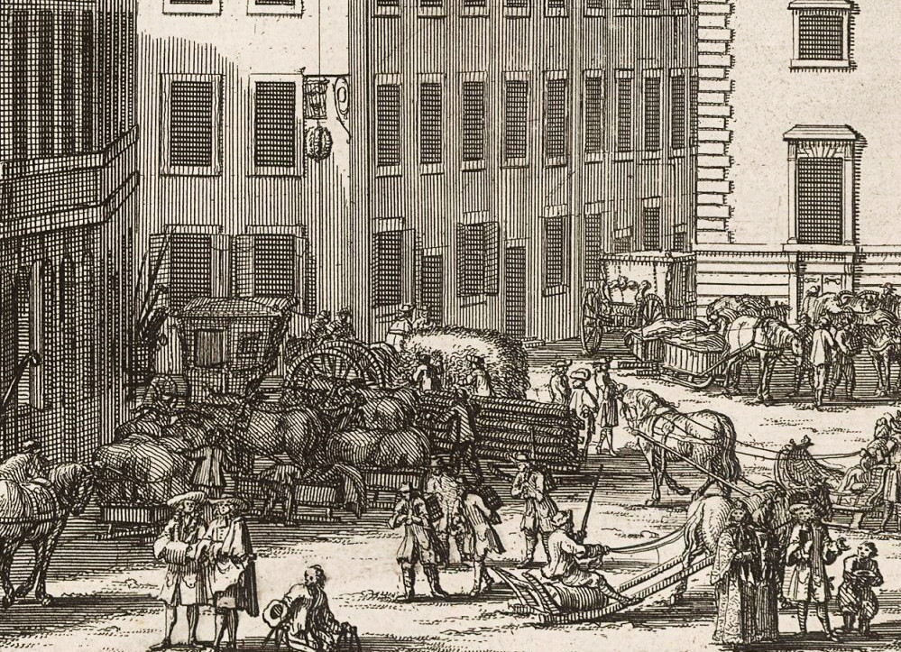 Värdshuset Tre Koronor i Kvarteret Proserpina, sedermera Bankokällaren vid Järntorget, del av Erik Dahlbergs illustration över Södra Bankohuset 1691.